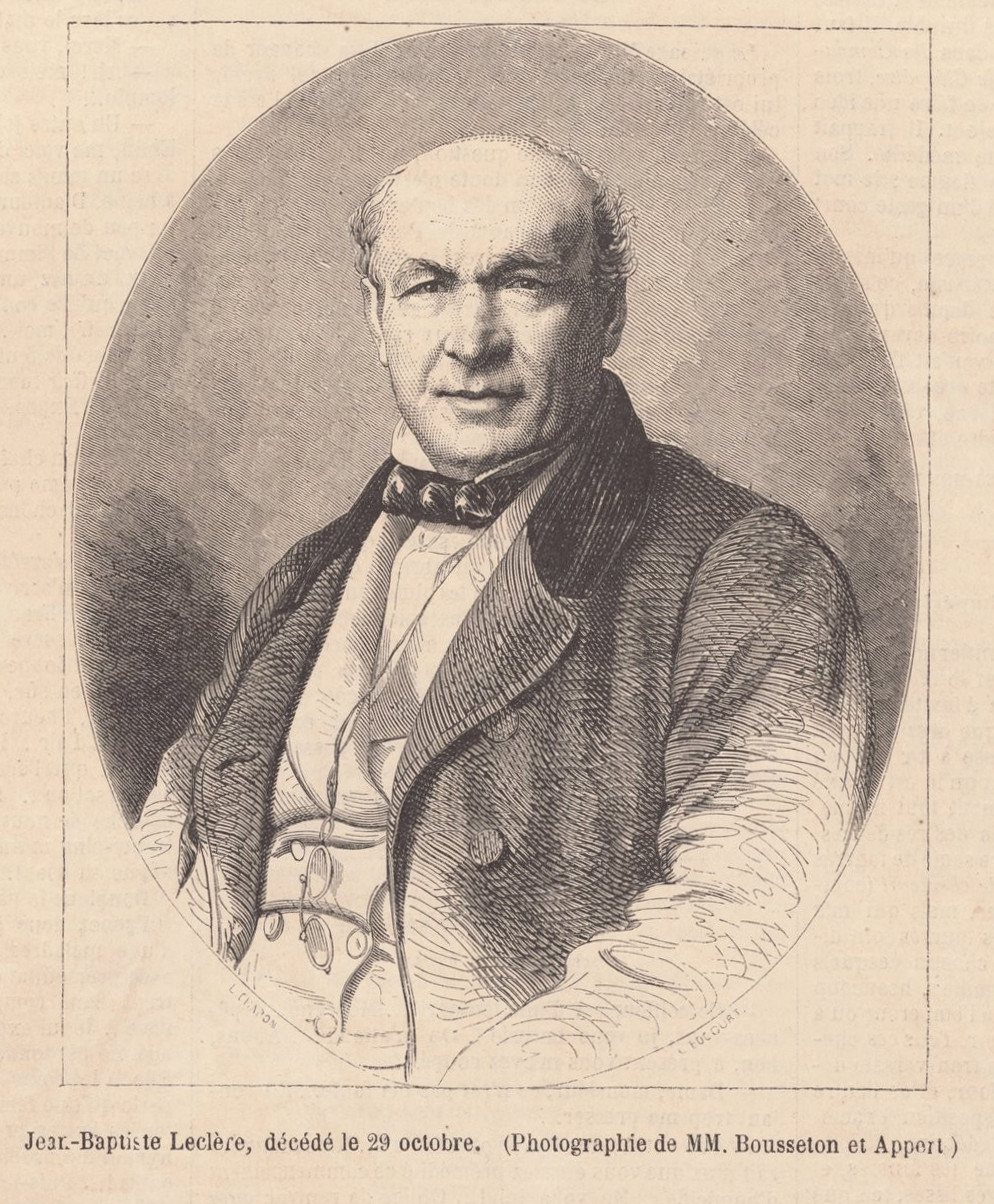 Jean-Baptiste Victor Adolphe Leclère acteur français, né le 8 février 1800 à Reims, mort le 29 octobre 1861 à Nogent-sur-Marne. Son acte de décès daté du 29 octobre 1861 est à Paris 9e, acte n° 1276.